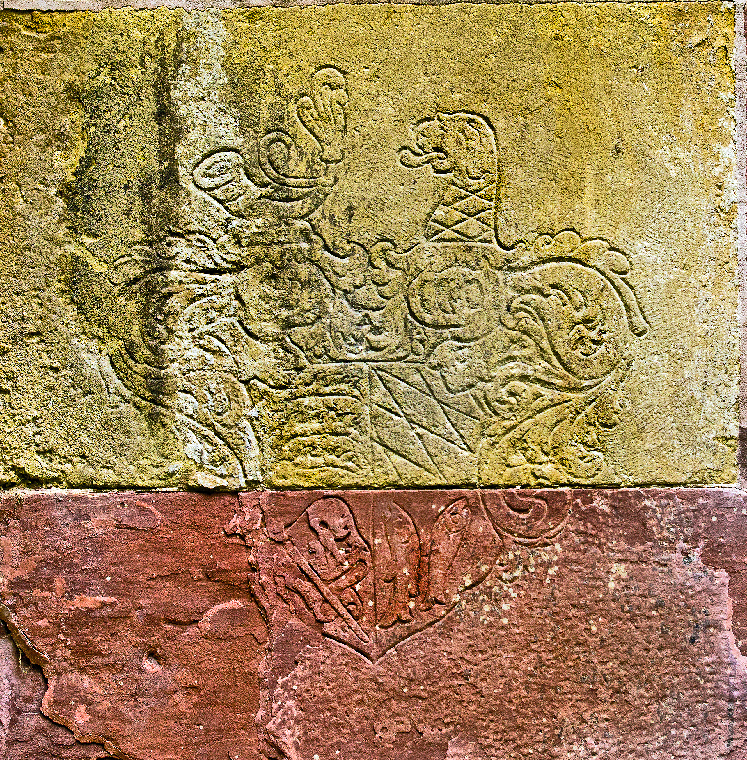 Reformationsdenkmal an der Südfassade der Hospitalkirche in Stuttgart, Wandrelief Nr. 2 (Nummerierung siehe file:Hospitalkirche, 002.jpg): Wappen Herzog Christophs.